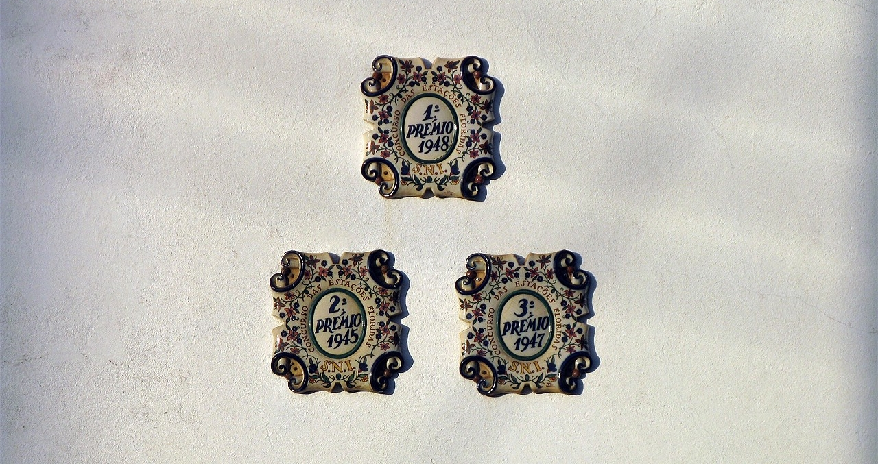 Hoje em dia há o prémio de "Estação mais degradada" Há tantos vencedores que não há prémios que cheguem...